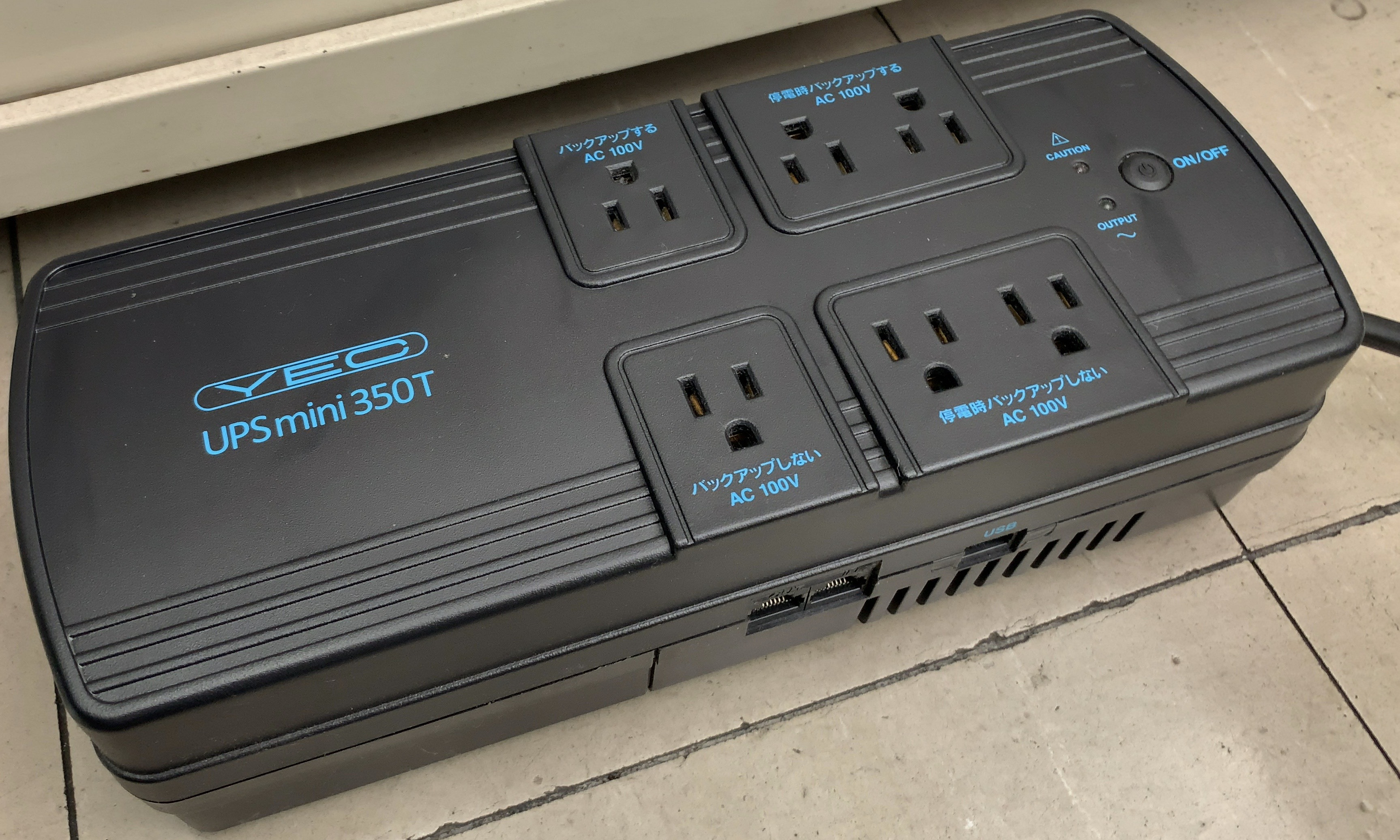 無停電電源装置（コンパクトタイプ）